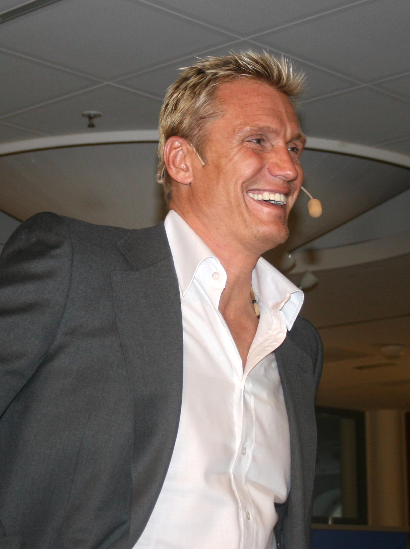 Dolph Lundgren